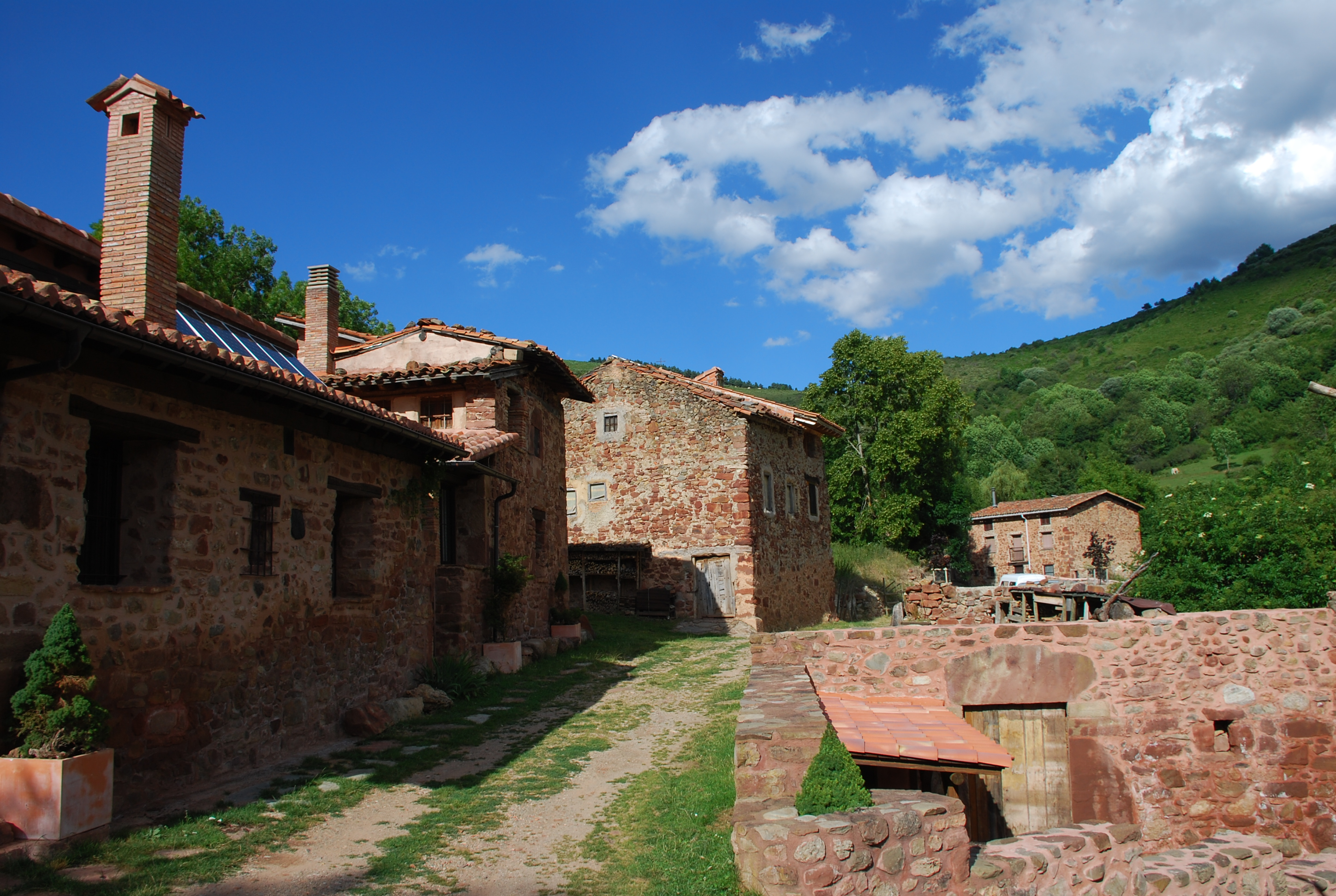 Turza, aldea de Ezcaray (La Rioja, España)